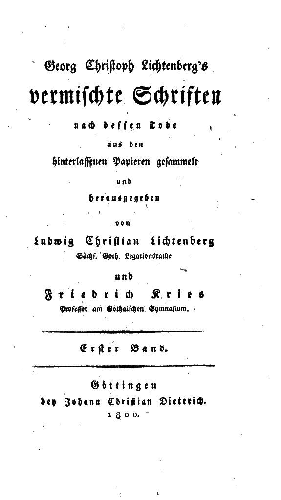 Georg Christoph Lichtenberg's vermischte Schriften. Nach dessen Tode aus den hinterlassenen Papieren gesammelt und herausgegeben von Ludwig Christian Lichtenberg und Friedrich Kries. 1. Band, Göttingen 1800, Titelblatt